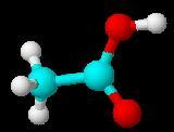 Kalottenmodell Essigsäure